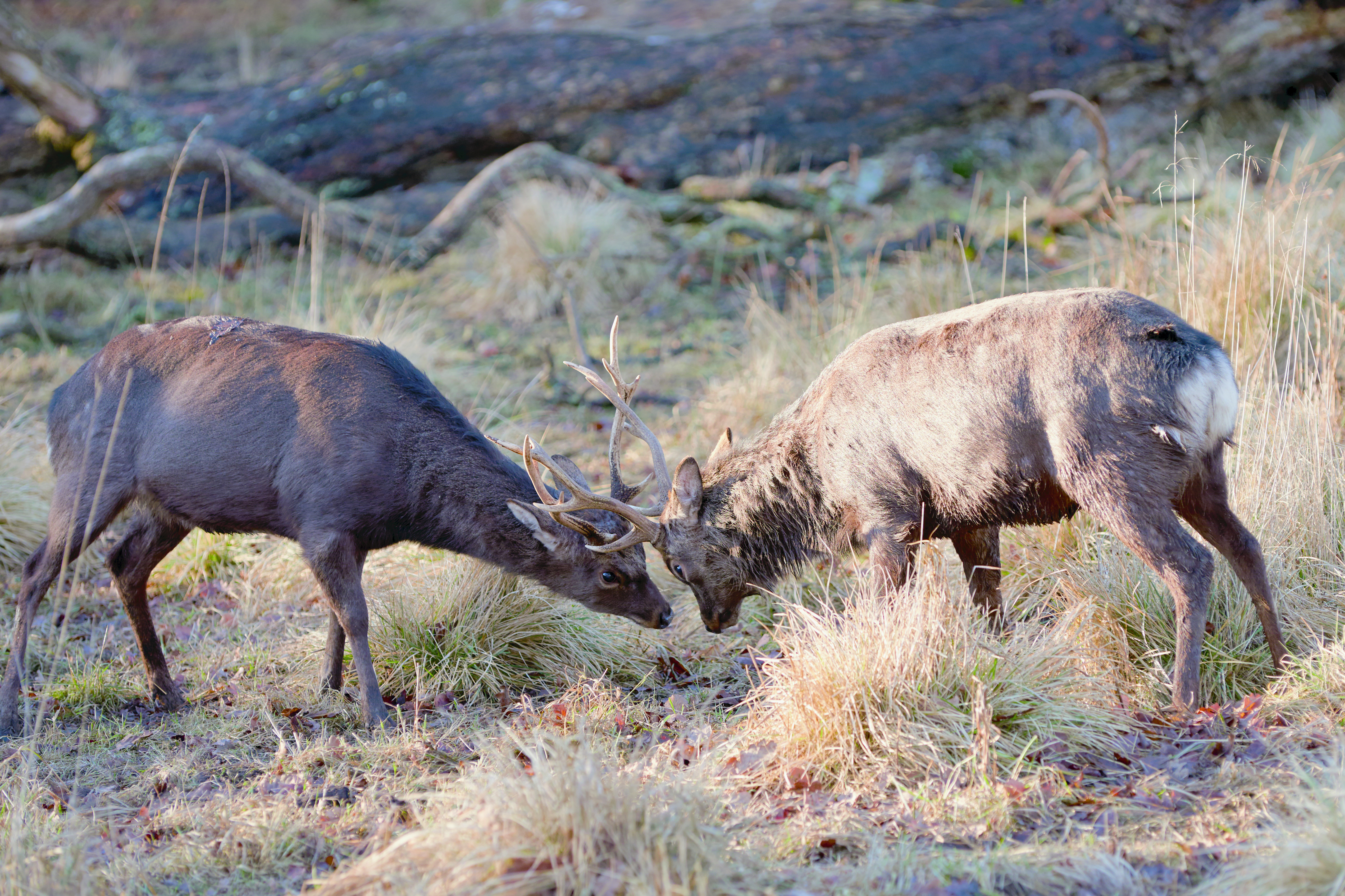 Foto af Claus Ørsted. Dyrehaven januar 2017